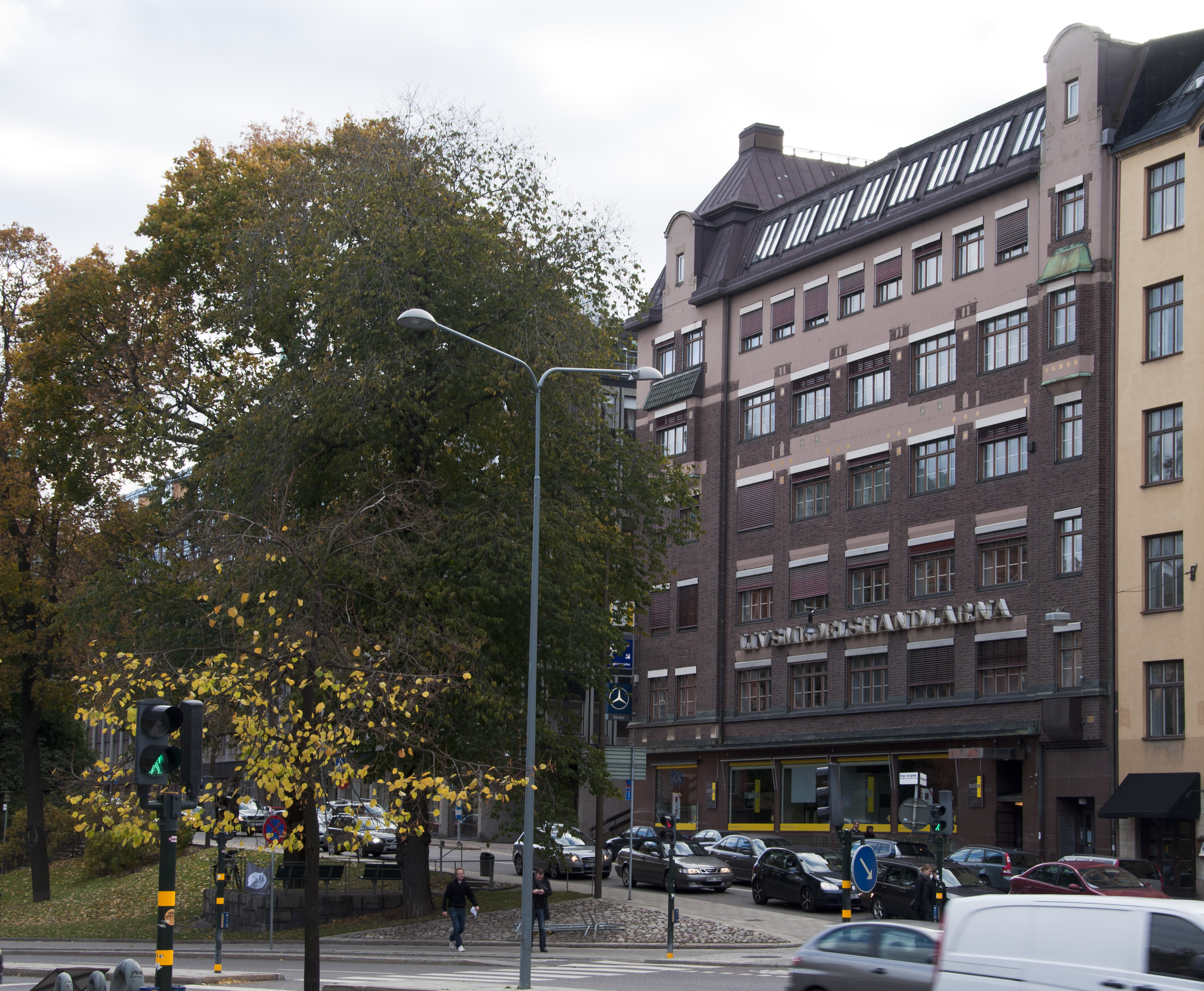 Regeringsgatan 109, Byggnadsår 1909-10, arkitekt Sigurd Westholm & John Bagger, byggherre AB Herzog & Söner, byggmästare A Holmgren.